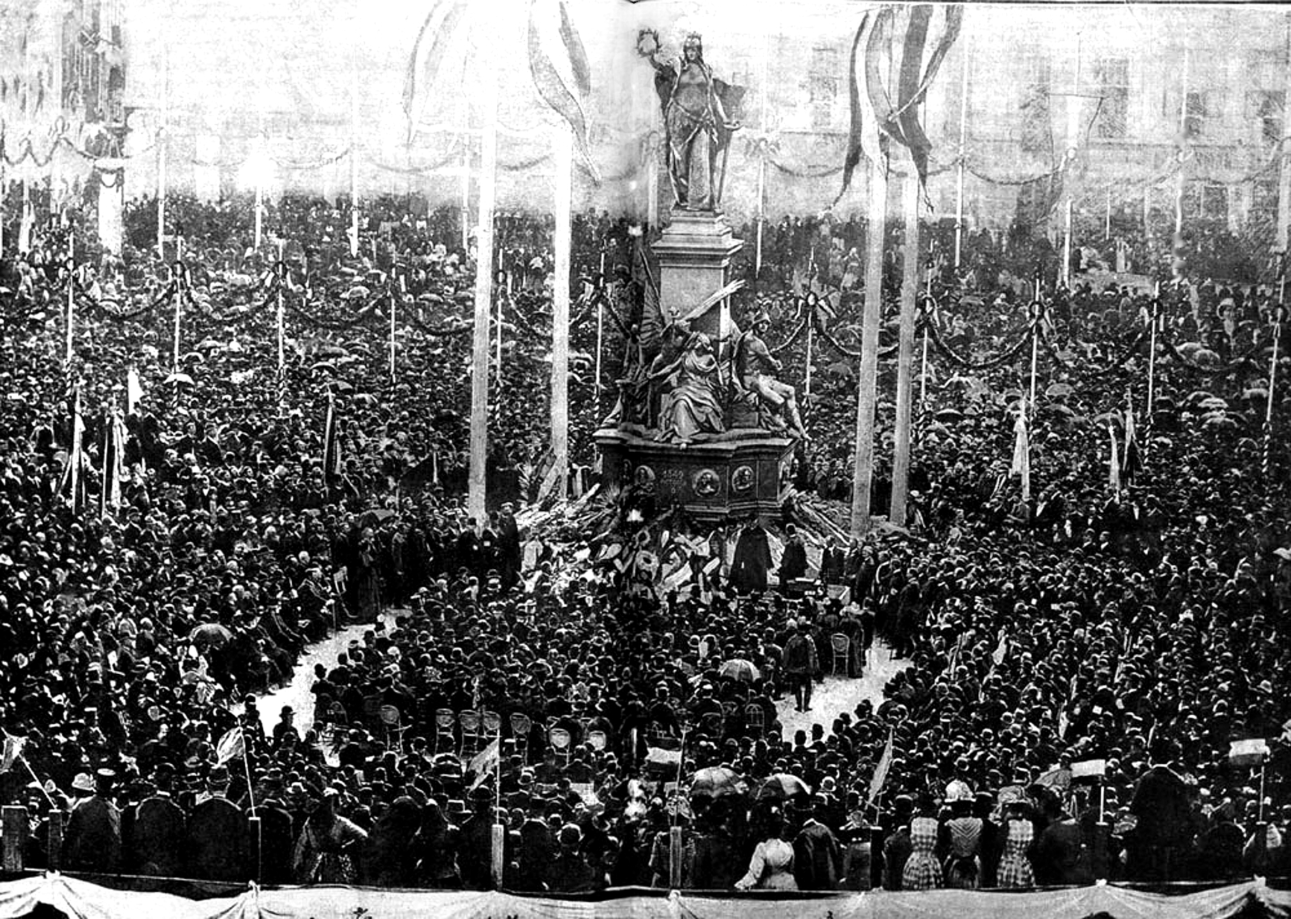 Az 1890. október 6-i aradi szoboravatási ünnepség fotója (Vasárnapi Ujság, 1890/42 [1] 02